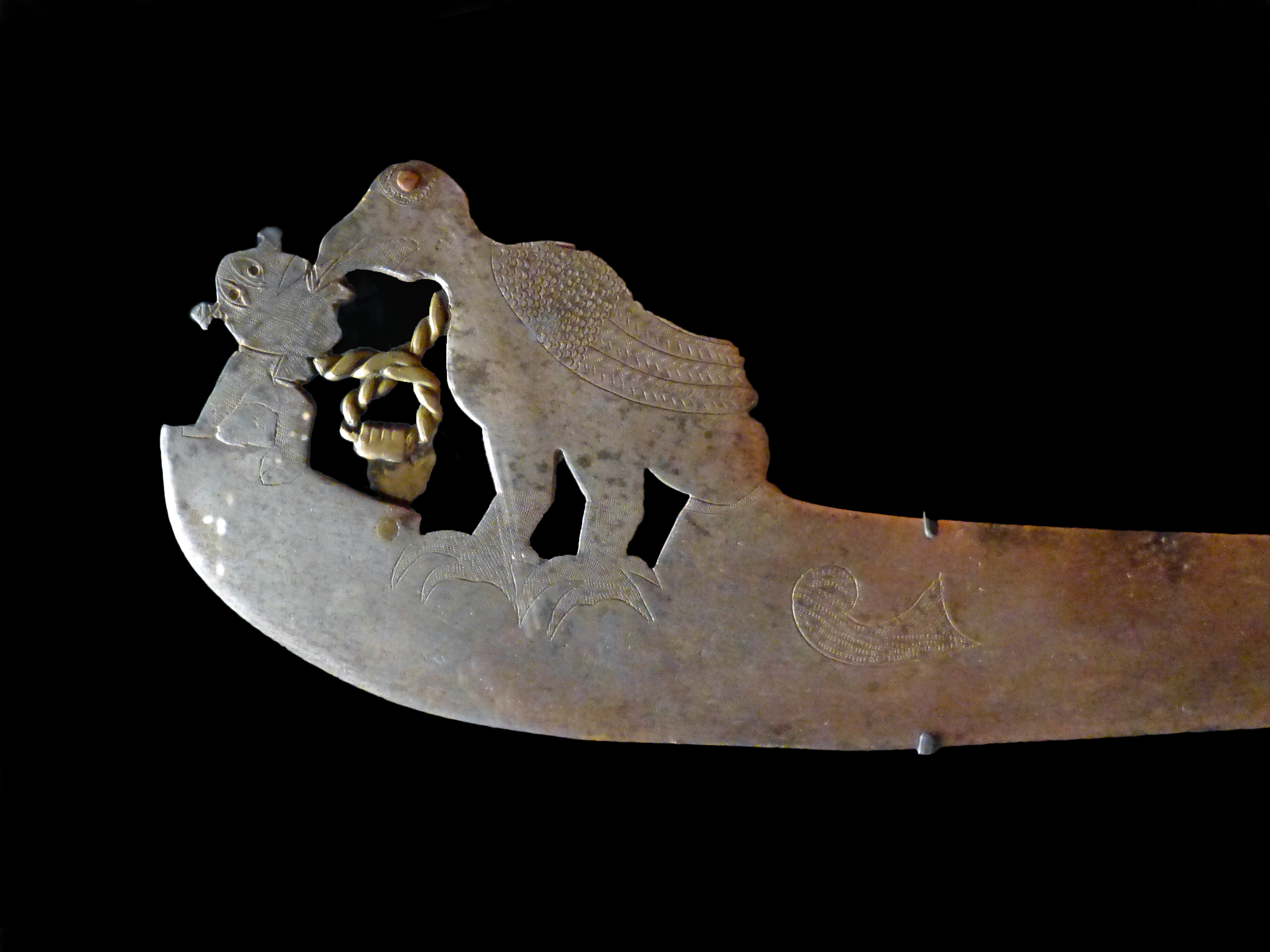 Détail d'un sabre d'apparat Attribué à la famille Hountondji (métal) 19e siècle La scène représente un oiseau qui crève les yeux d'un homme, rappelant la puissance du Danhomè sur ses ennemis. Musée du Quai Branly Don : Georges Henri Rivière N° d'inventaire : 71.1931.49.7